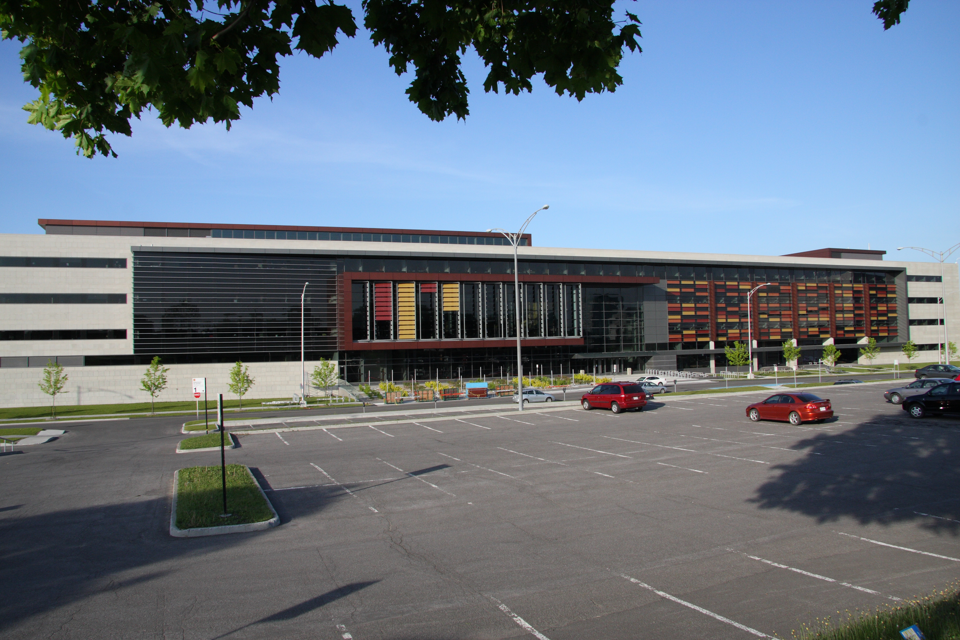 Pavillon Ferdinand-Vandry où se trouve les facultés de médecine, de pharmacie et des sciences infirmières, Université Laval.